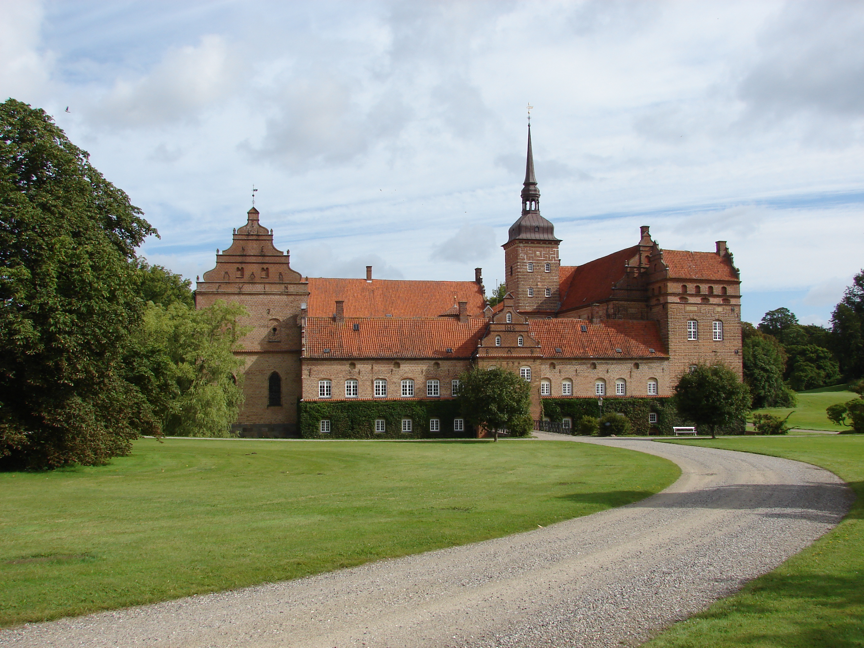 Holckenhavn Slot, ved Nyborg, Fyn